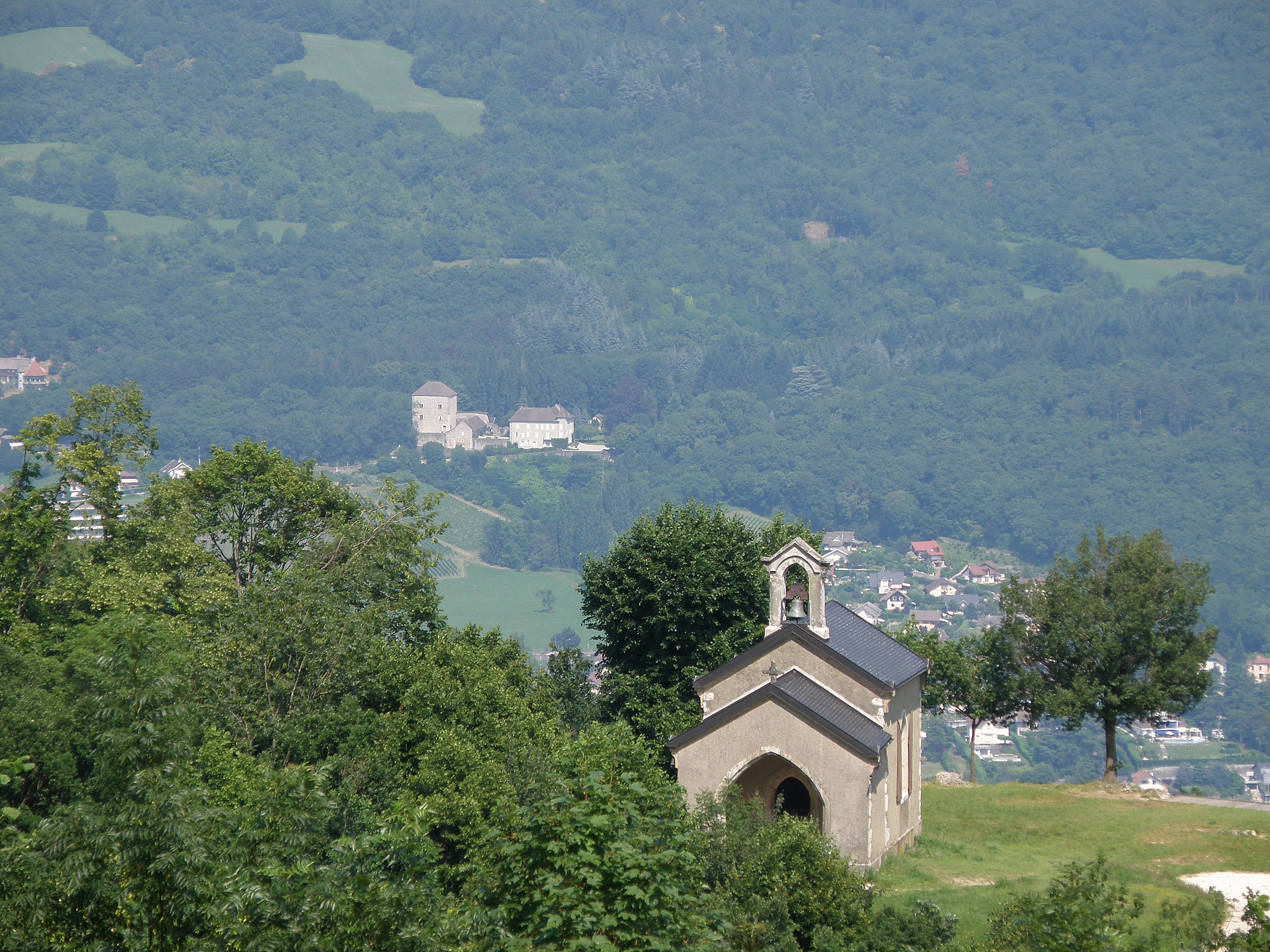 La Chapelle-du-Mont-du-Chat, comm. du département de la Savoie (région Rhône-Alpes, France), sur la rive occidentale du lac du Bourget. À l'avant-plan au centre, la chapelle Notre-Dame-de-l'Étoile, située en contrebas du village. Au loin, sur la rive opposée du lac, le château de Saint-Innocent (comm. de Brison-Saint-Innocent).